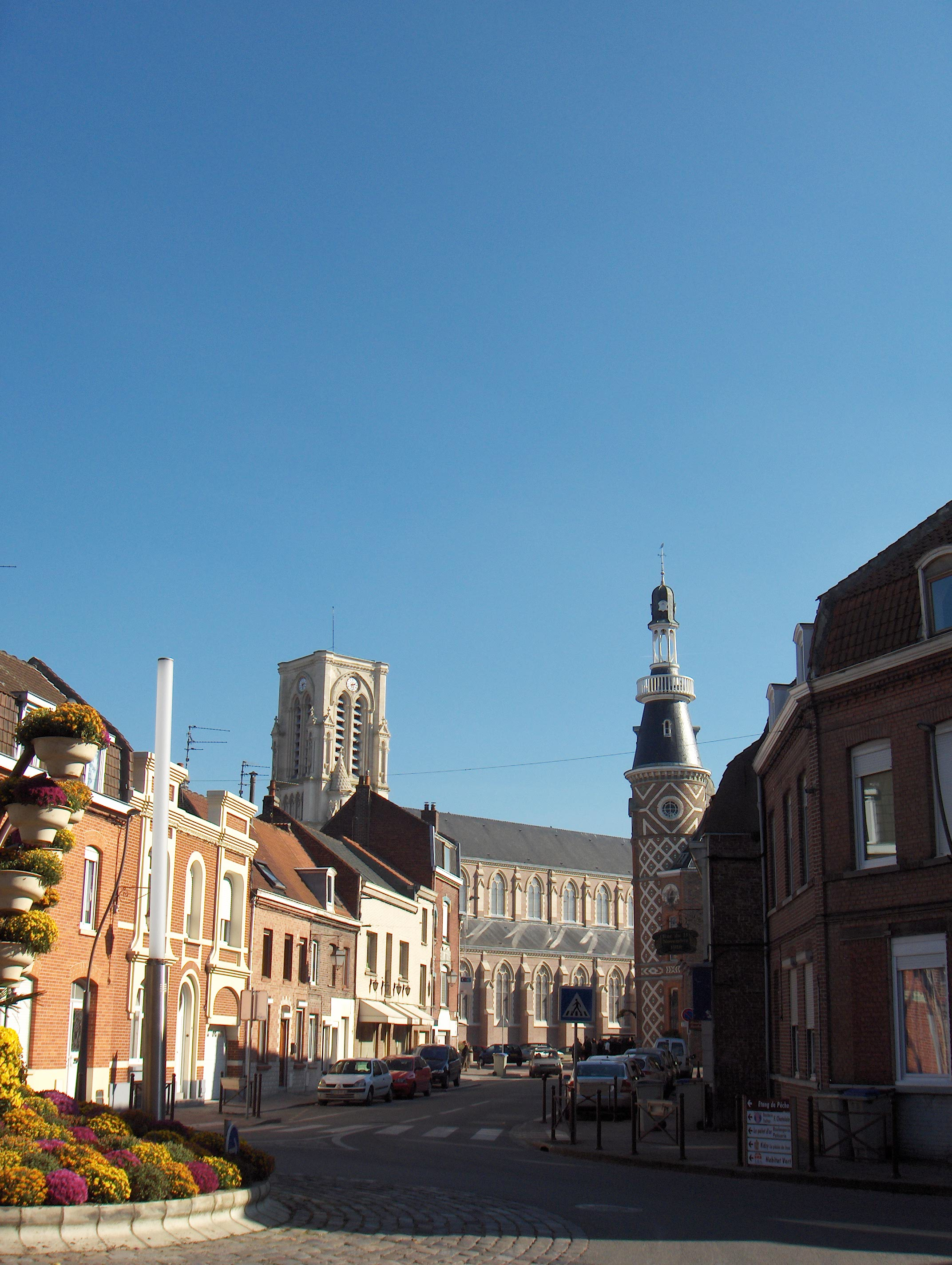 Wambrechies (France, dépt. Nord), centre ville, rue du 11 nov., église Saint-Vaast (1861) et tour de la mairie.